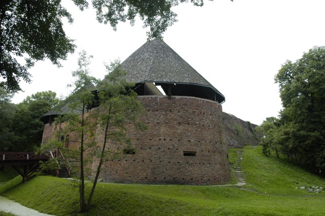 Poland, Miedzyrzecz - castle.